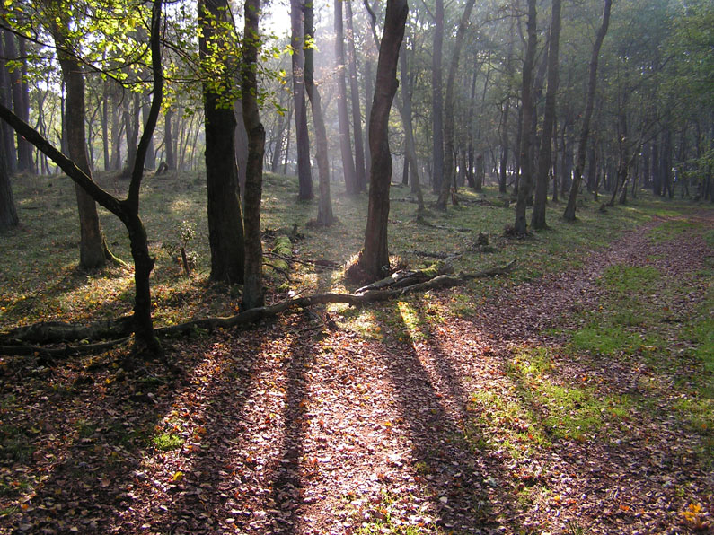 Bos in Hooghalen in e herfst